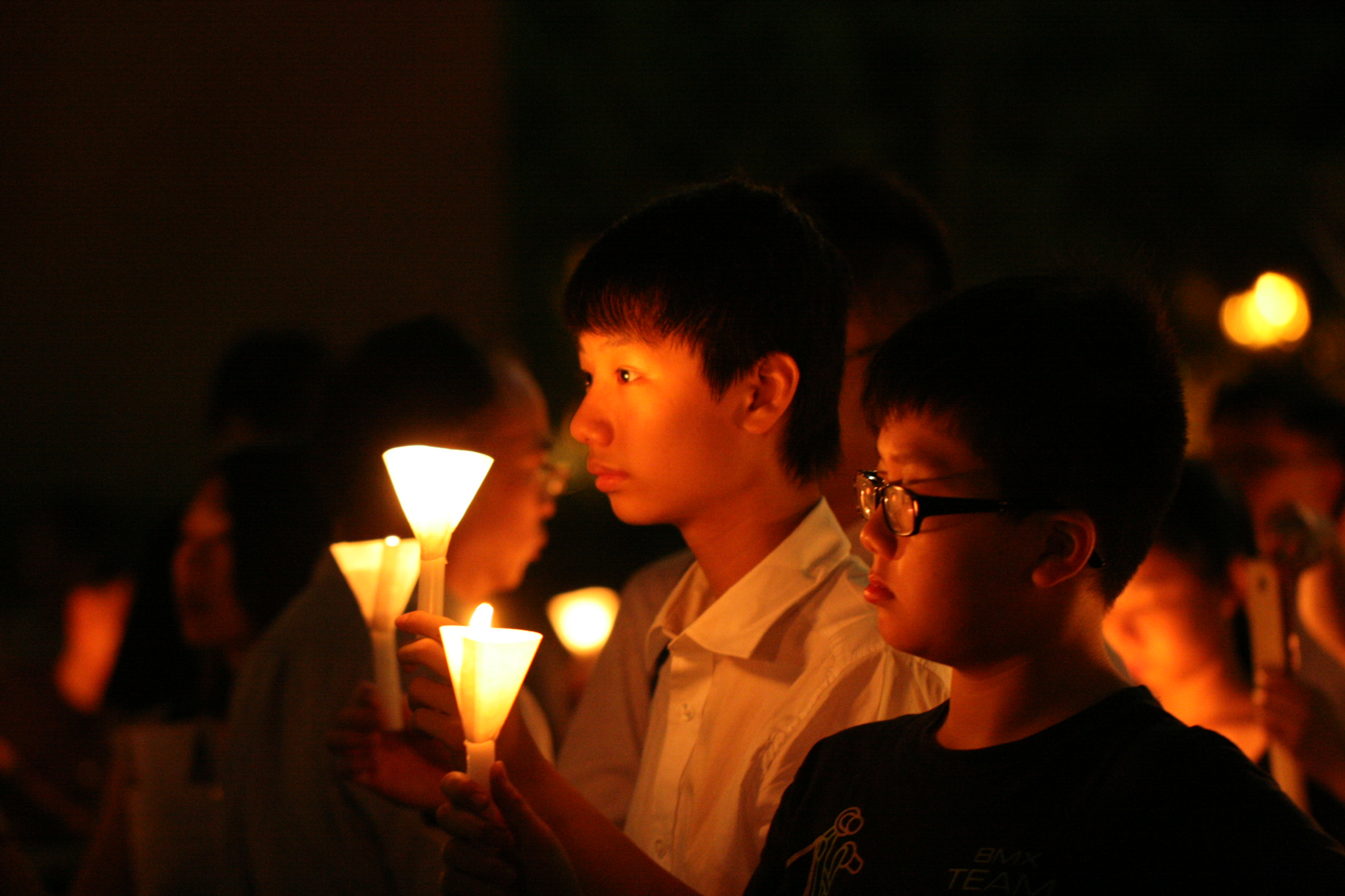 近年来最大规模的一场纪念六四活动2012年6月4日在香港举行。活动组织者说，多达18万人出席了在港岛维多利亚公园举行的这场烛光悼念活动，其中许多人来自中国大陆。